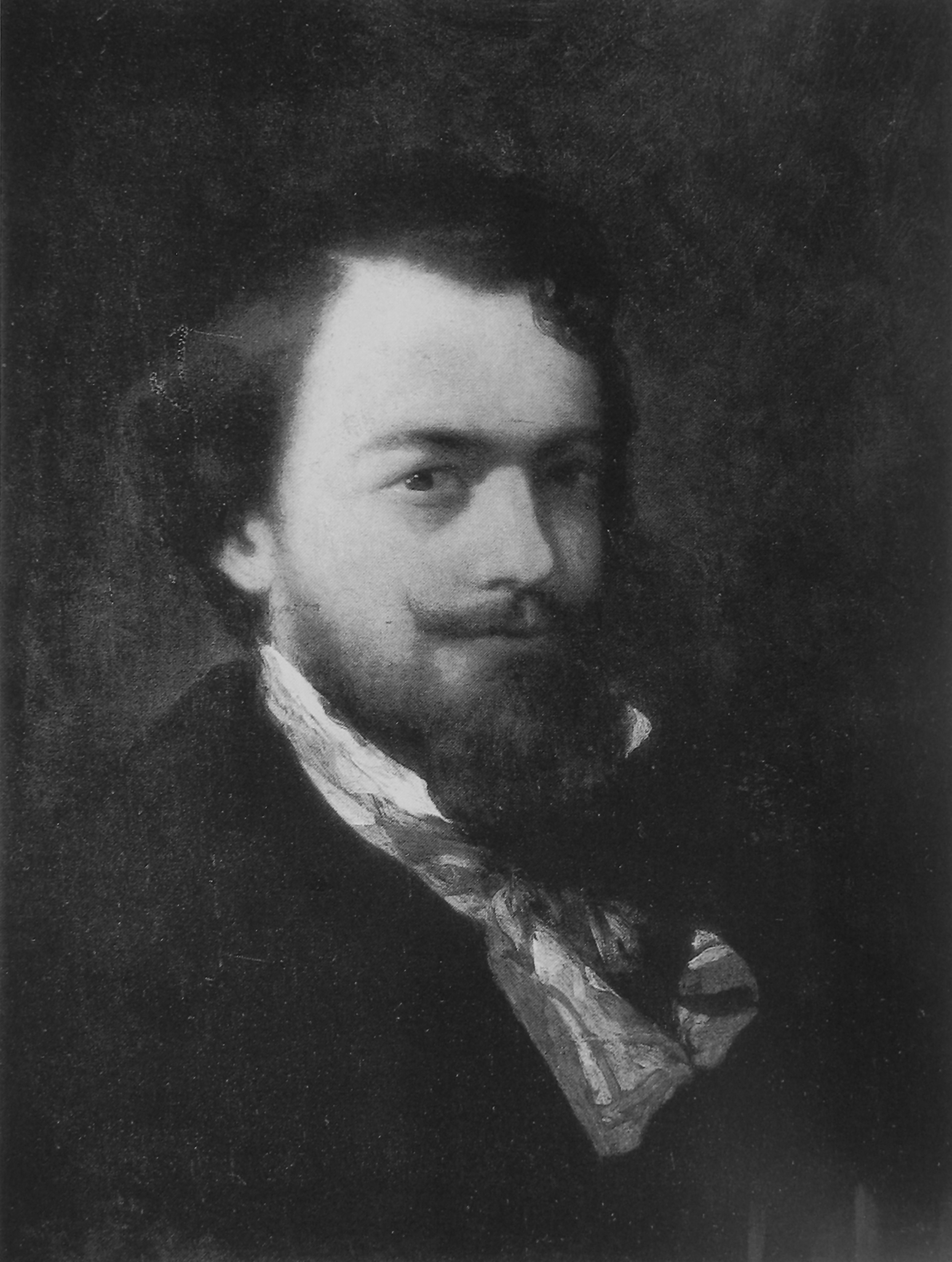 Selbstbildnis des Malers Charles Hoguet, vor 1870